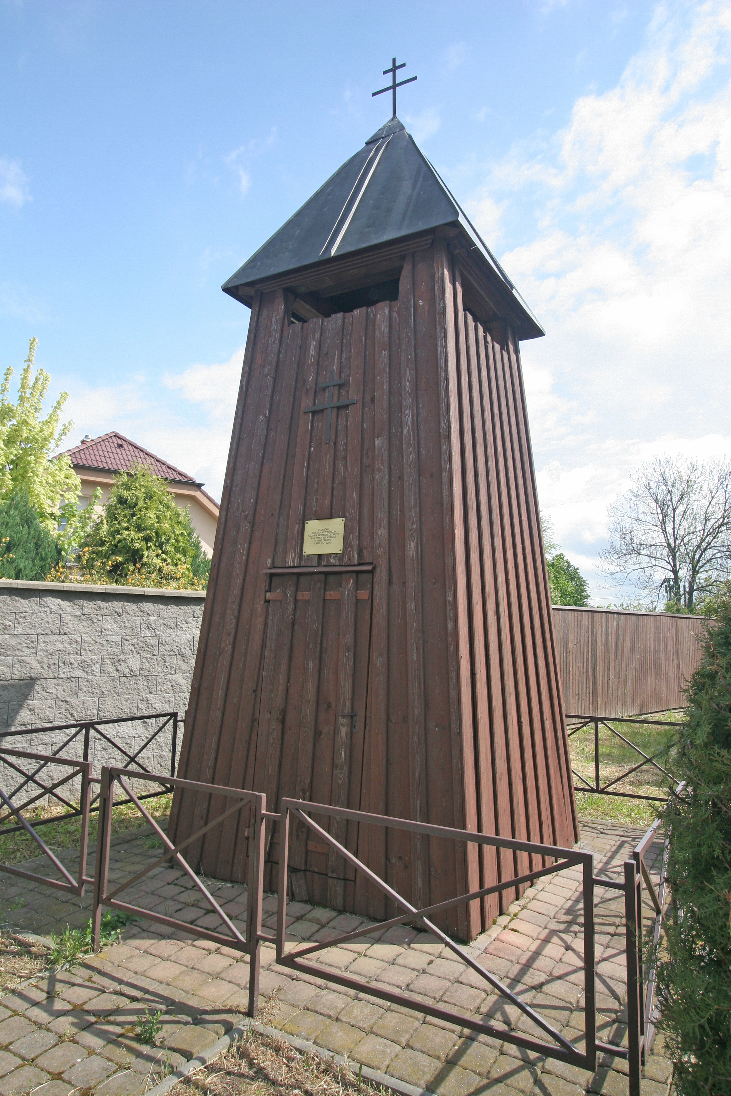 Blato zvonička